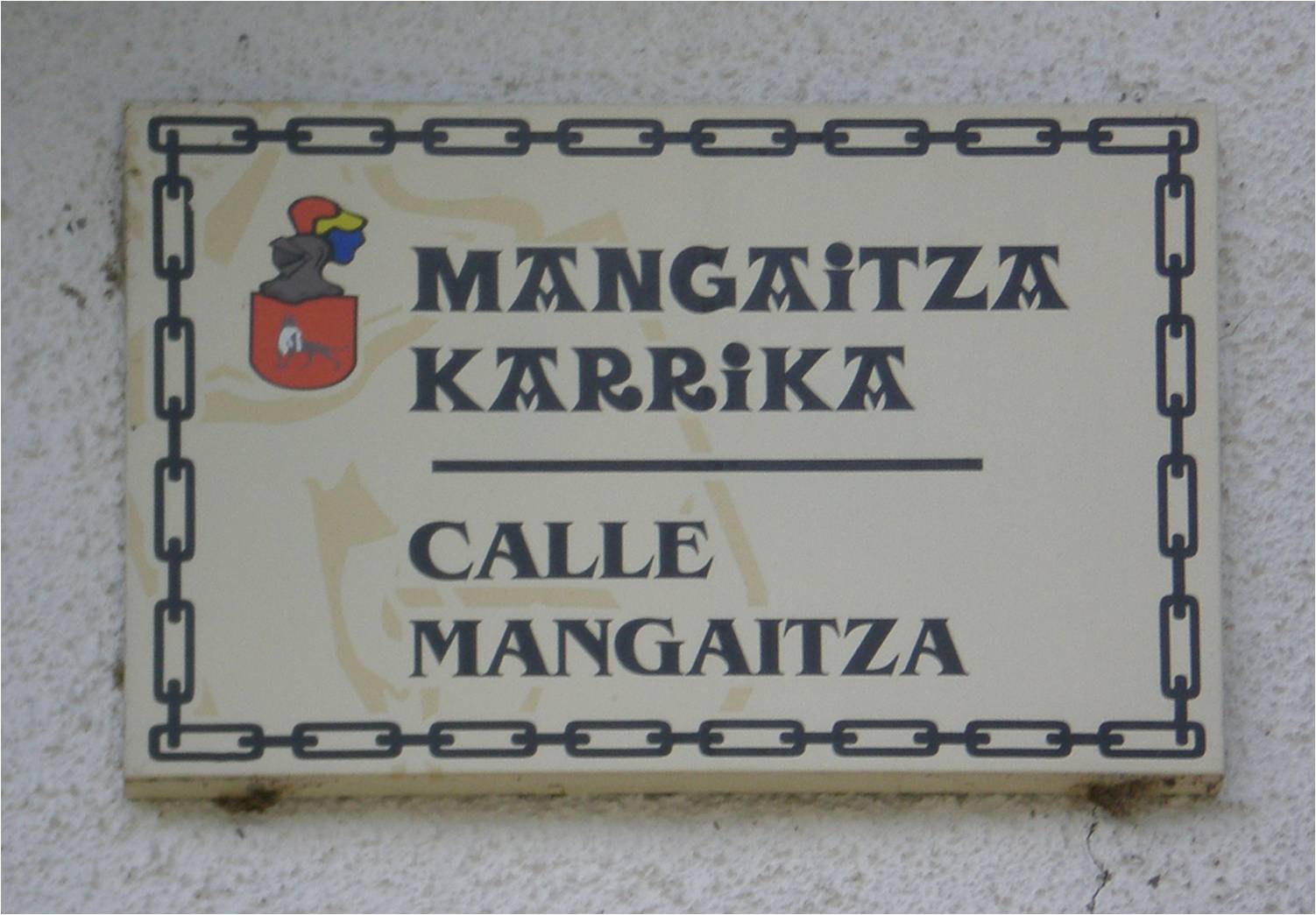 Zaraitzuko karrika